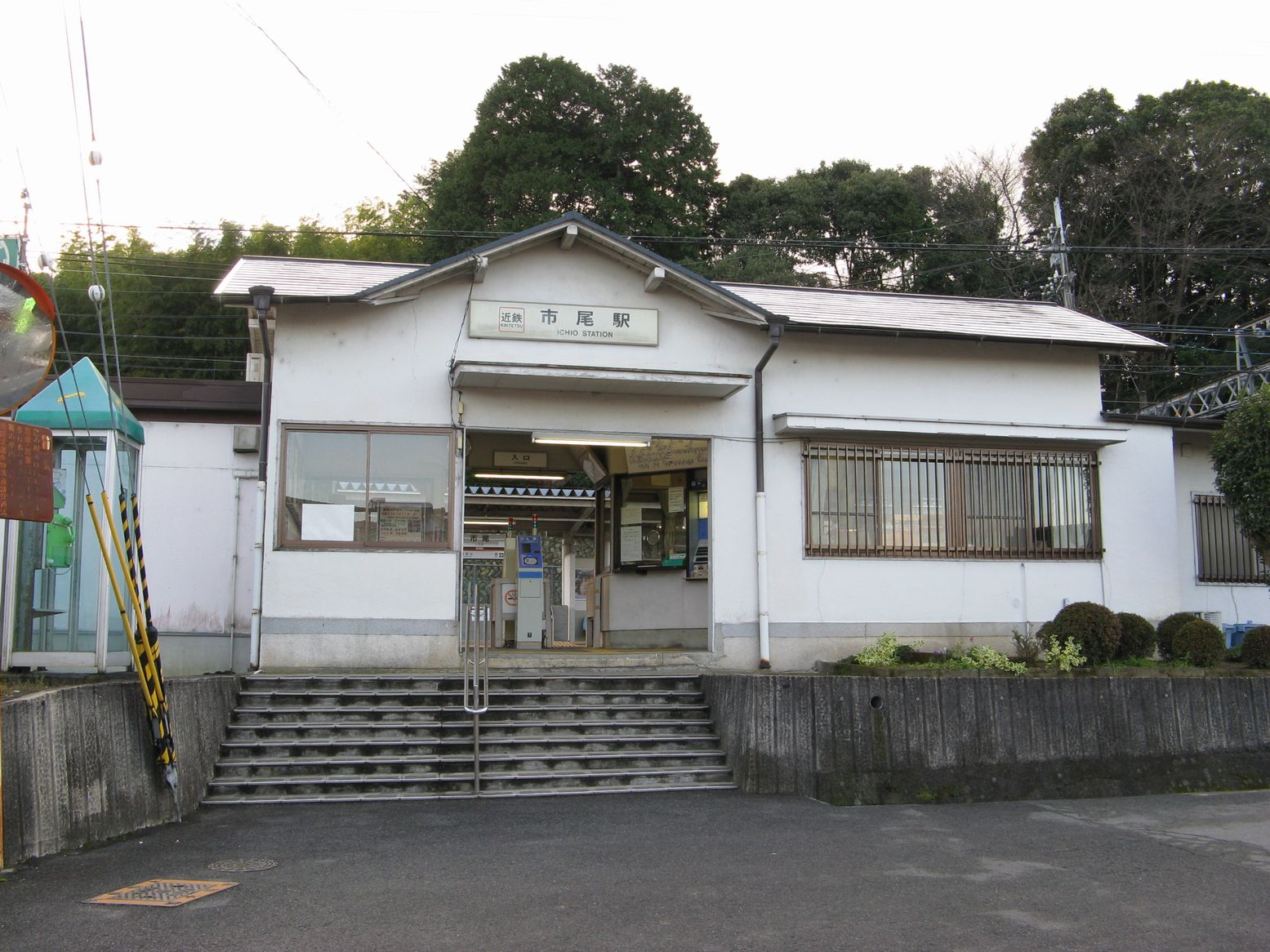 市尾駅 駅舎